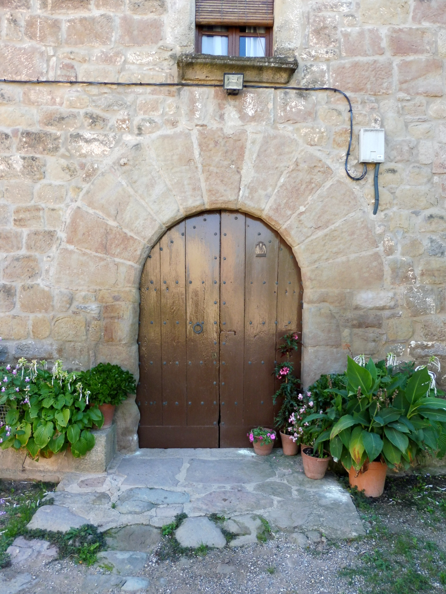 Cal Gili de Sorba (Montmajor): portal